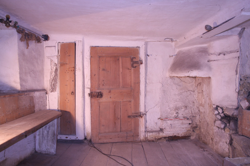 Bauernhaus "Villa Goldonkel" in Pfronten, Stube des alten Hofes